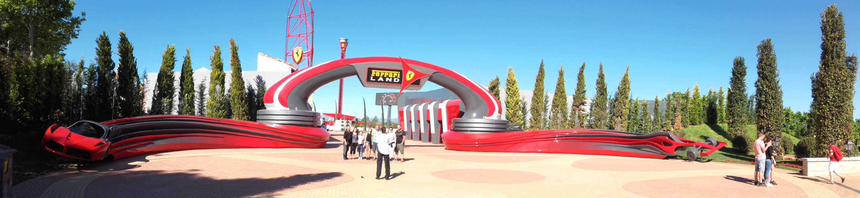 Entrée de Ferrari Land